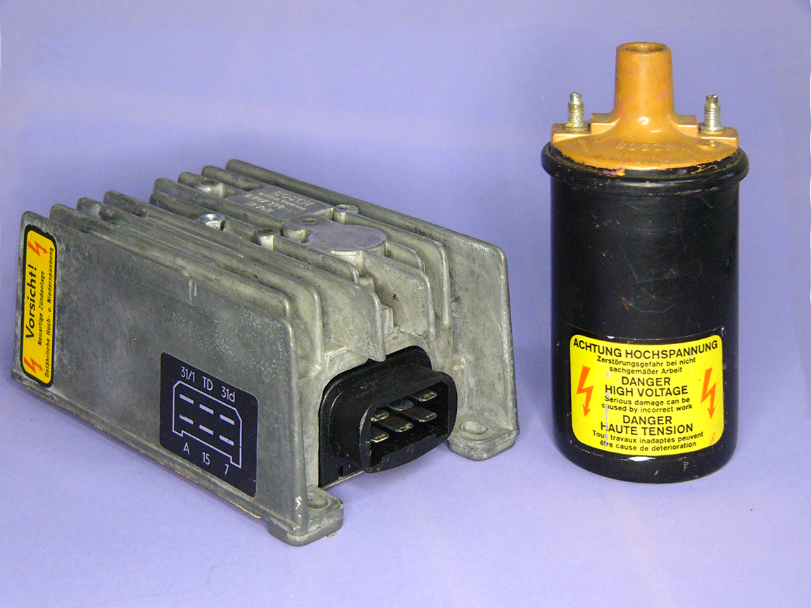 Bosch Hochspannungskondensatorzündung für kontaktlose Ansteuerung per Induktivgeber.